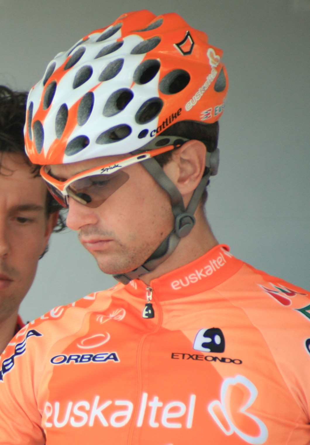 Aitor Hernandez, à l'Eneco Tour 2008, à Ardooie